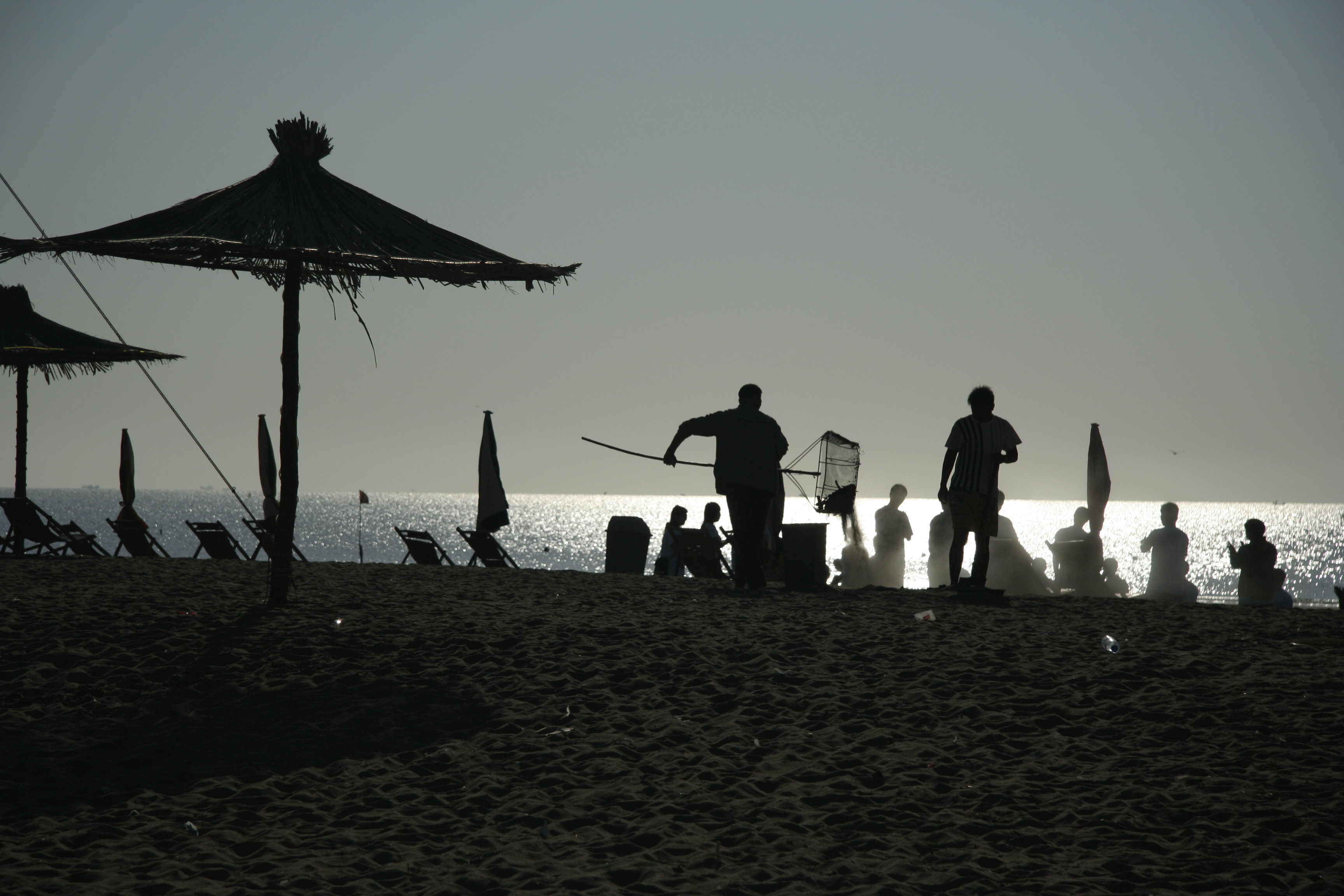 nandaihe